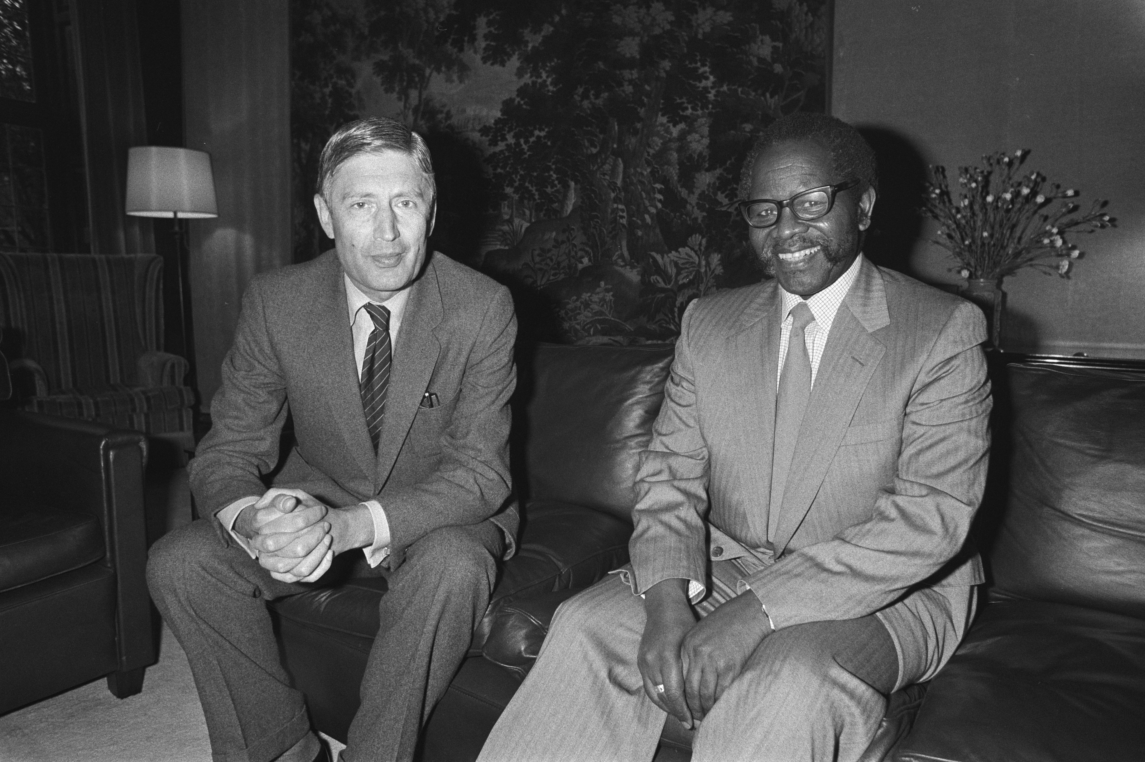 Premier Van Agt (CDA) heeft Oliver Tambo, voorzitter van het African National Congress, ontvangen in het Catshuis 19 oktober 1981